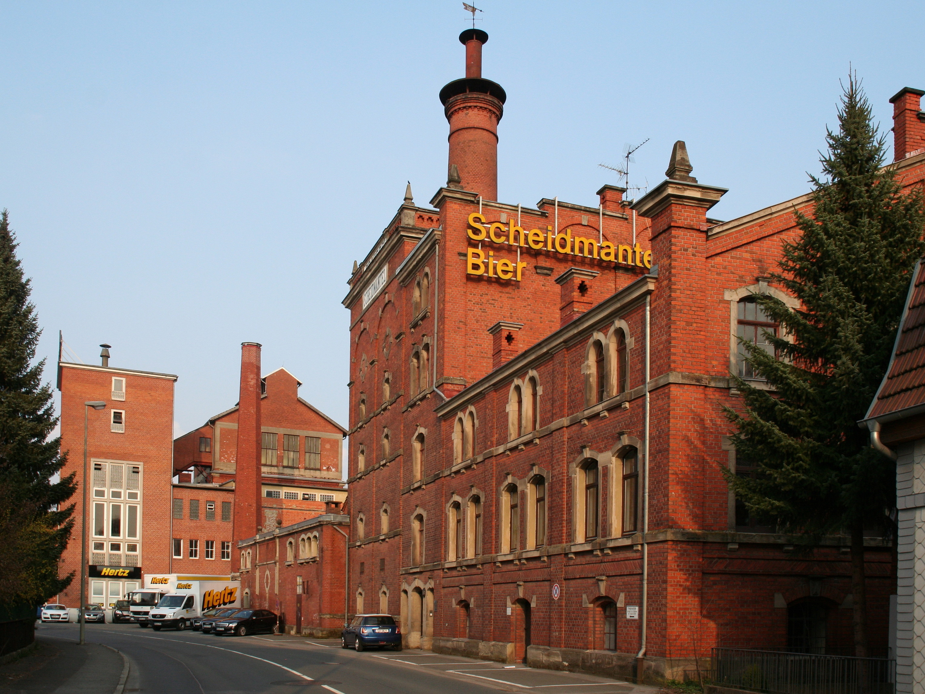 Brauerei Scheidmantel, Rosenauer Straße 98/100, Coburg-Cortendorf